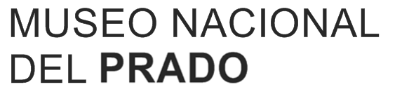 Logotipo del Museo Nacional del Prado, en Madrid, España. Ha sido realizado por mí con base al diseño oficial del logo de la web, que utiliza letras similares a las Arial pero no idénticas por lo que me ha sido preciso retocar mínimamente algunos tamaños. Si bien en la web utiliza este logo, en su canal de YouTube comienza los vídeos con este formato de letra pero en la misma línea, sin la palabra Prado en negritas y todo subrayado. En alguna entrada del museo figura este formato de letra, aunque también sin la palabra Prado en negritas.